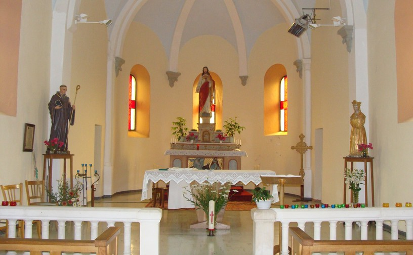 Vue de l'intérieur de l'église d'Ambel (Isère, France)